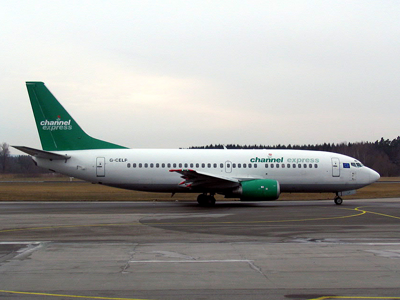 Channel Express Boeing 737-300 in Friedrichshafen